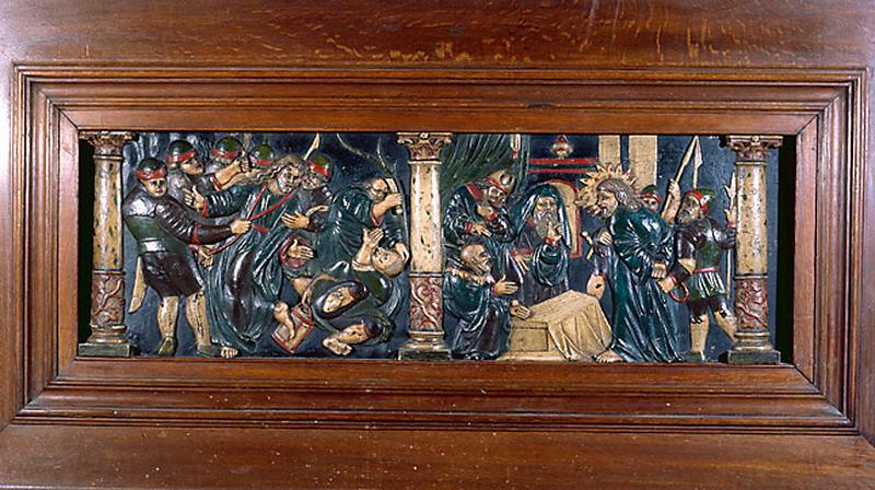 Arrestation de Jésus au Jardin des Oliviers. Banc d’œuvre en bois polychrome.